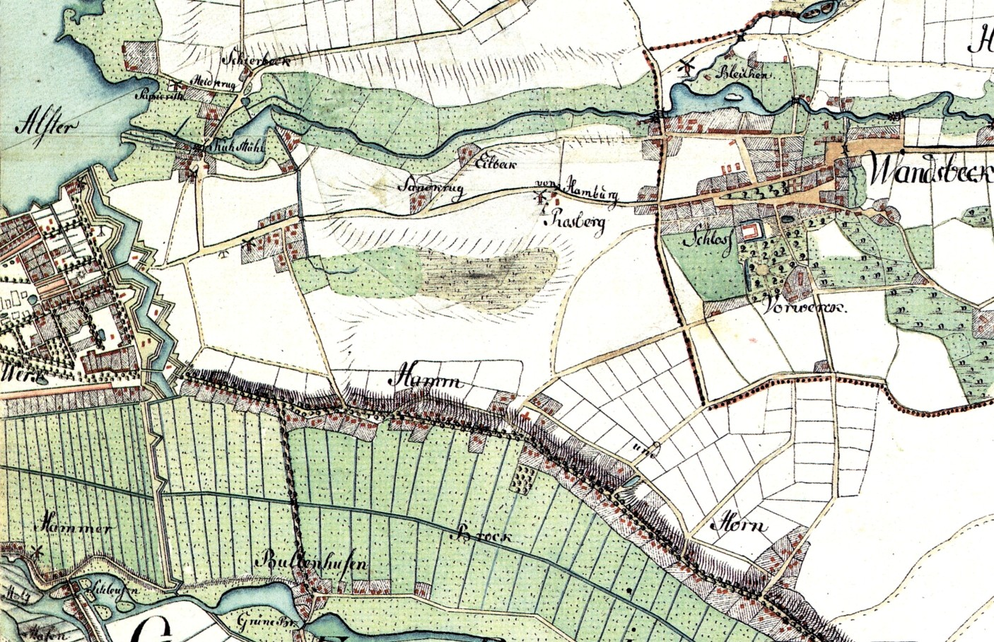 Ausschnitt aus der Karte: Bergedorf, Reinbek. Aufgenommen in den Jahren 1789 bis 1796 unter der Direktion des Majors Gustav Adolf von Varendorf durch Offiziere des Schleswigschen Infanterieregiments